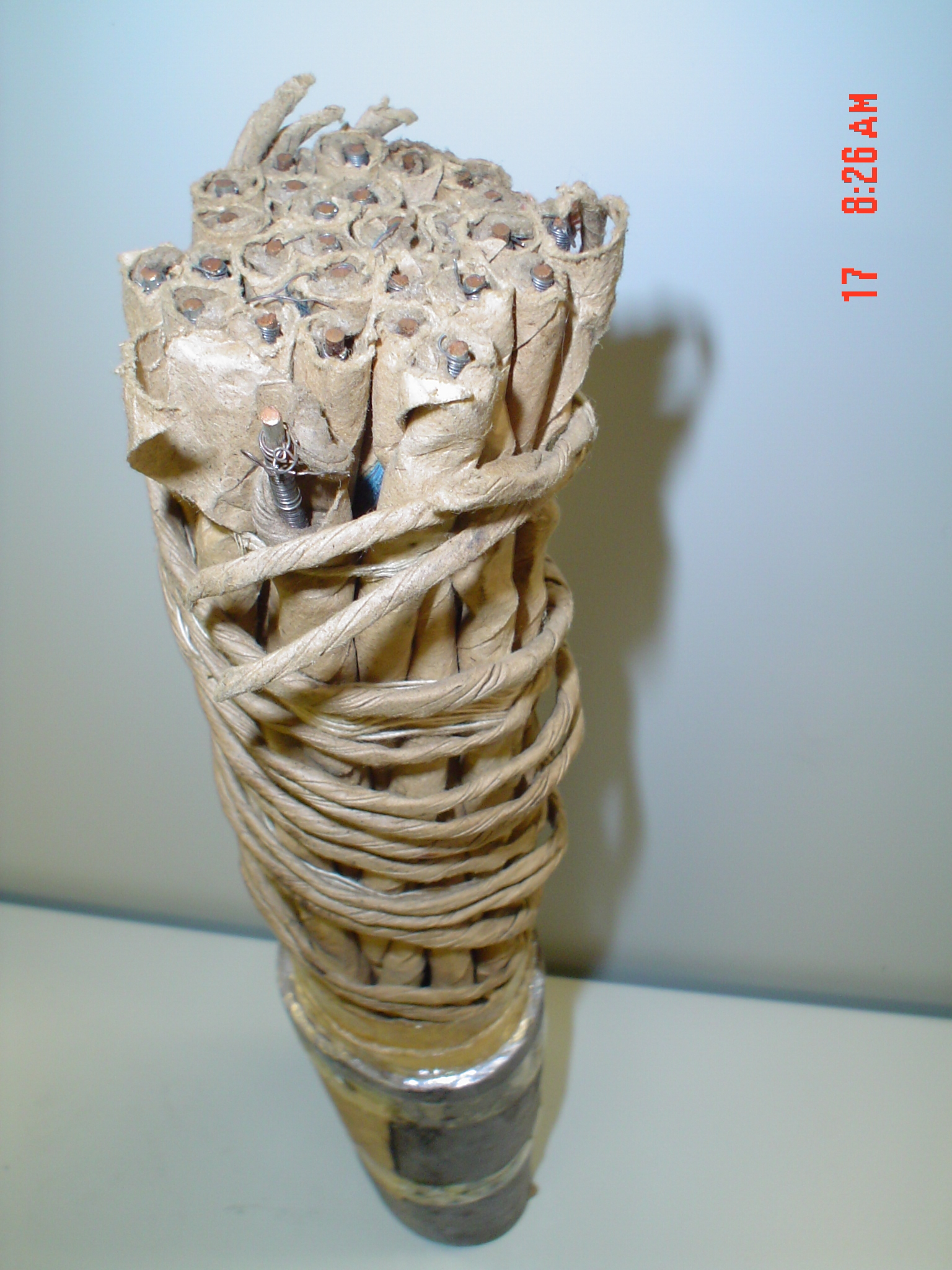 Kablo Krarup kun 28 da kupraj konduktiloj, papera aerspeca izolaĵo, kuseno el 3 papertavoloj, plumba ŝelo.